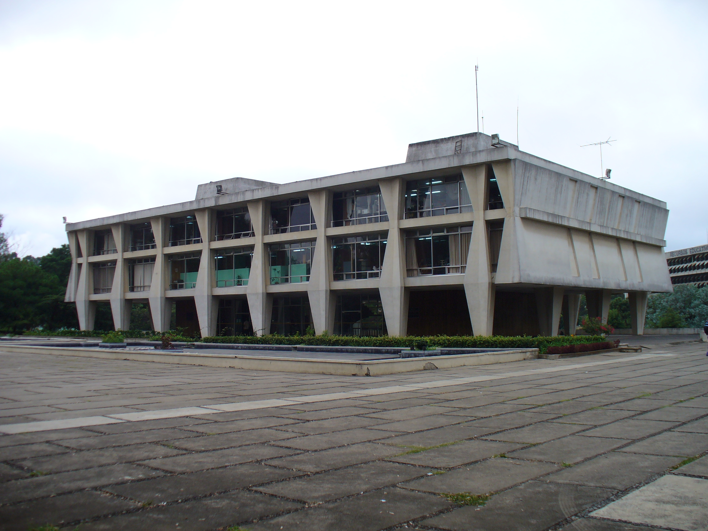 Edificio de Rectoría, Ciudad Universitaria, zona 12